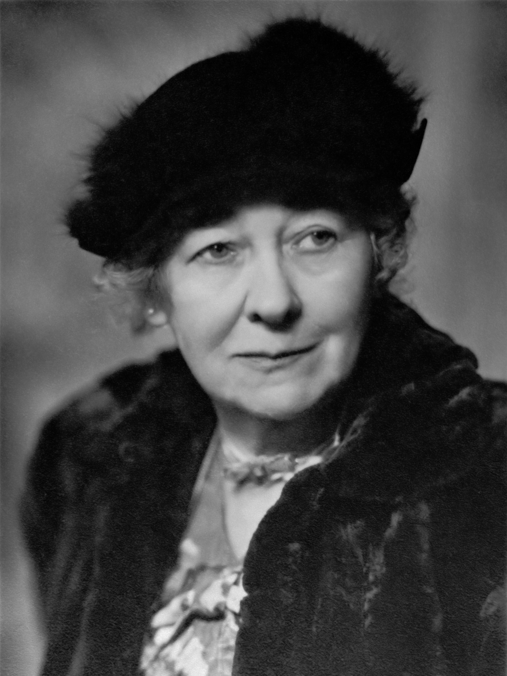 Lizzy Ansingh 13 maart 75 jaar 9 maart 1950